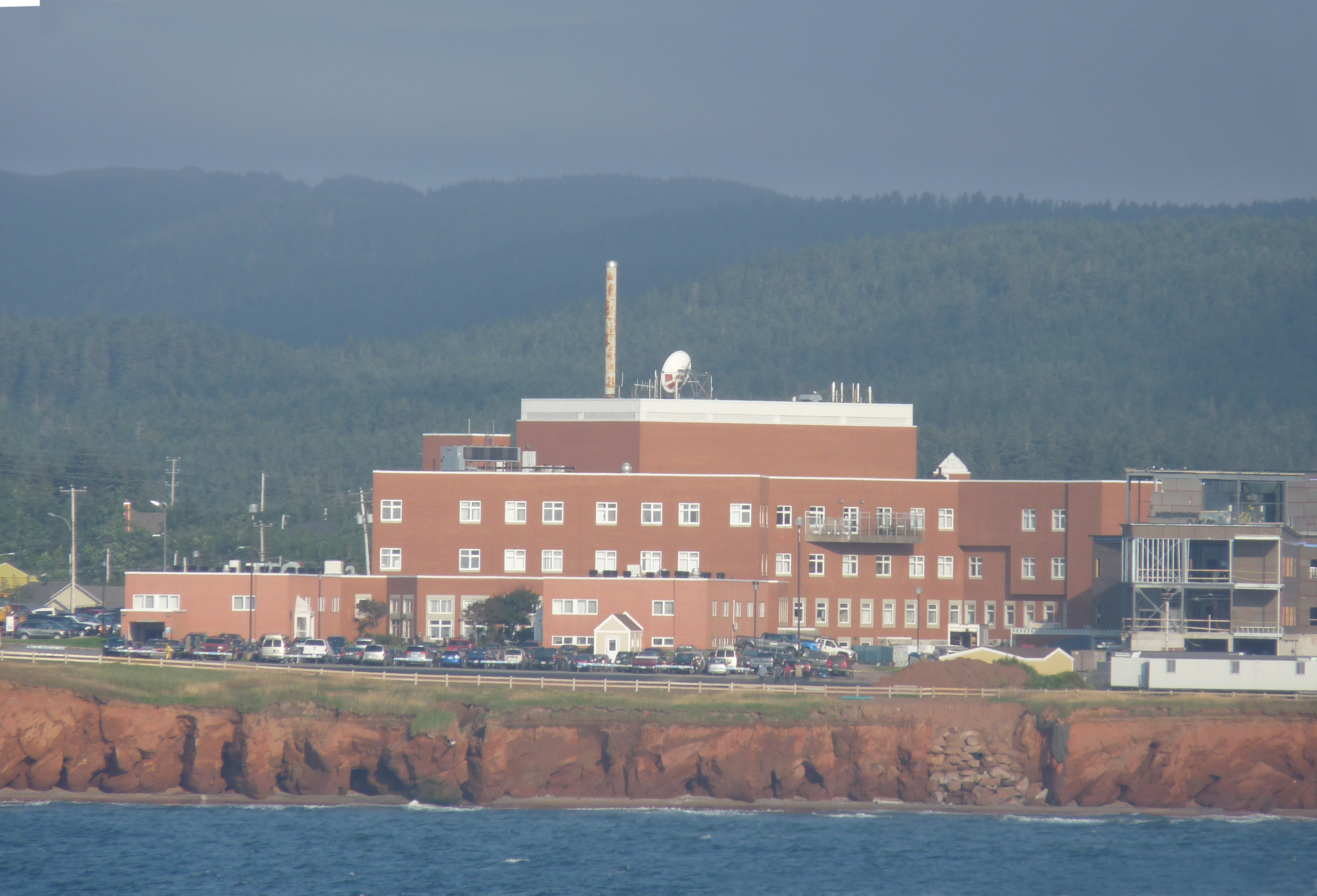 Hopîtal des Îles de la Madeleine